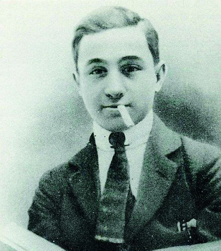 Luigi Gattuso detto Gigino